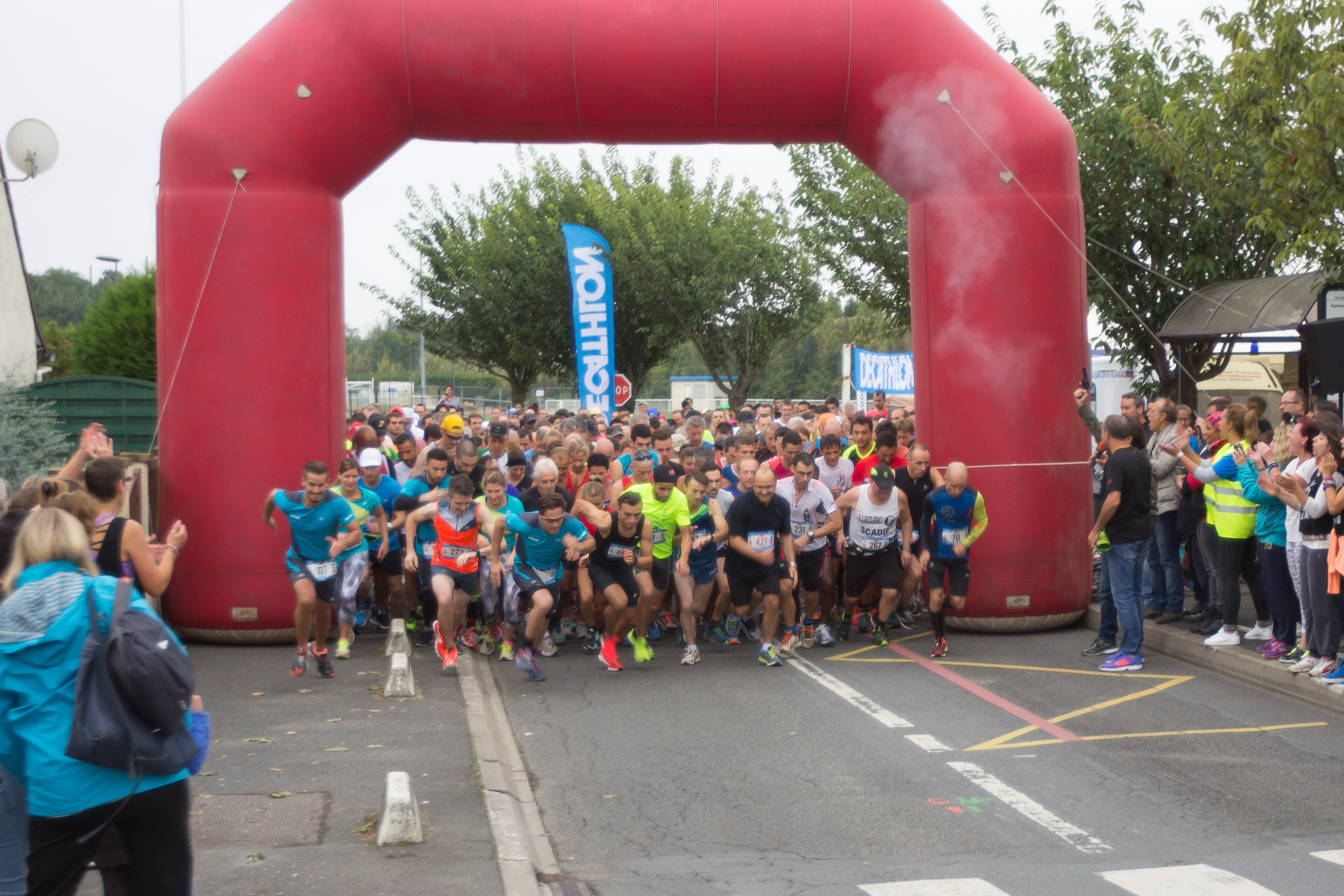 La course « La Foulée des Brettes 2016 », 18 septembre 2016 (Villabé, Essonne, France)